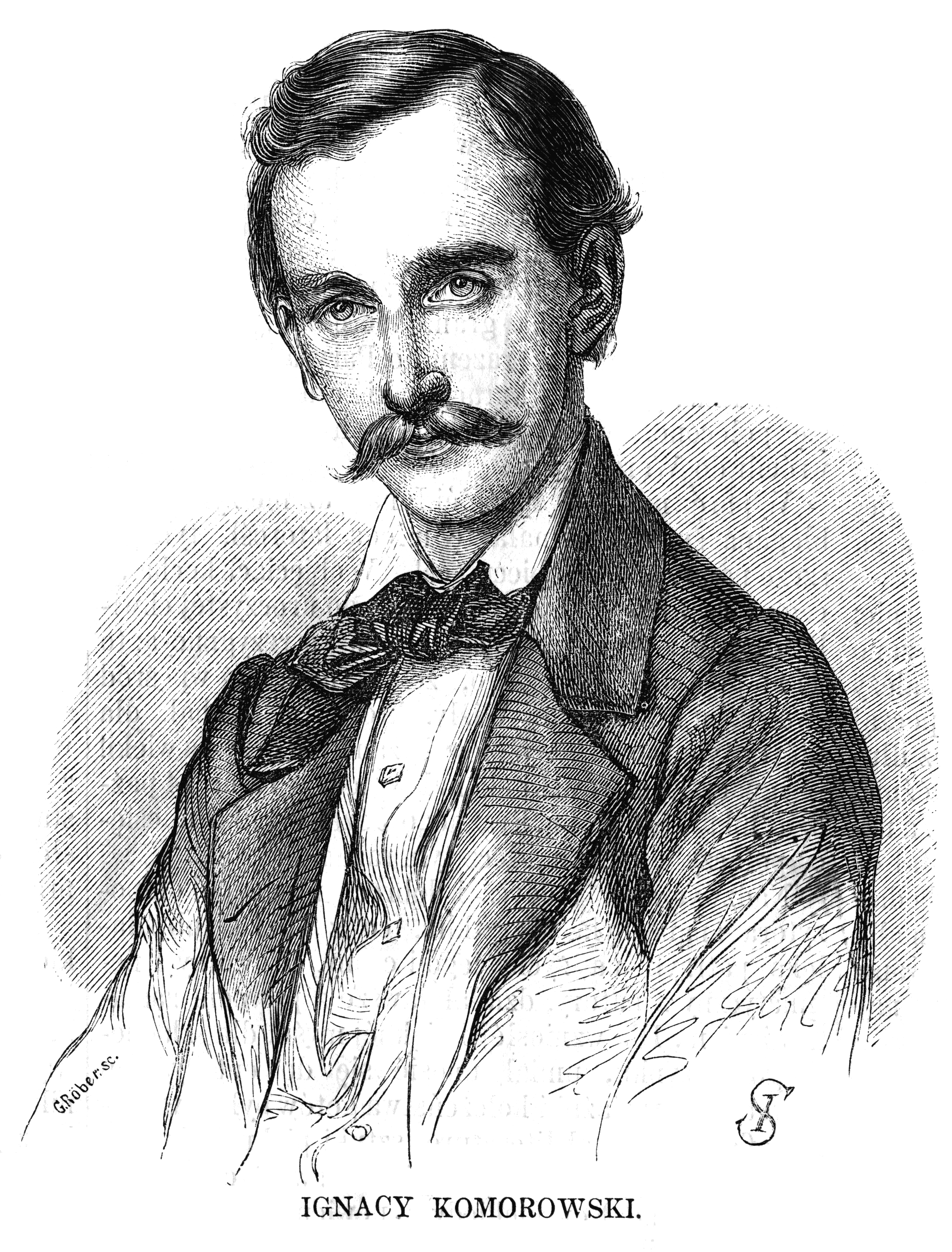 Ignacy Komorowski (1824-1857)